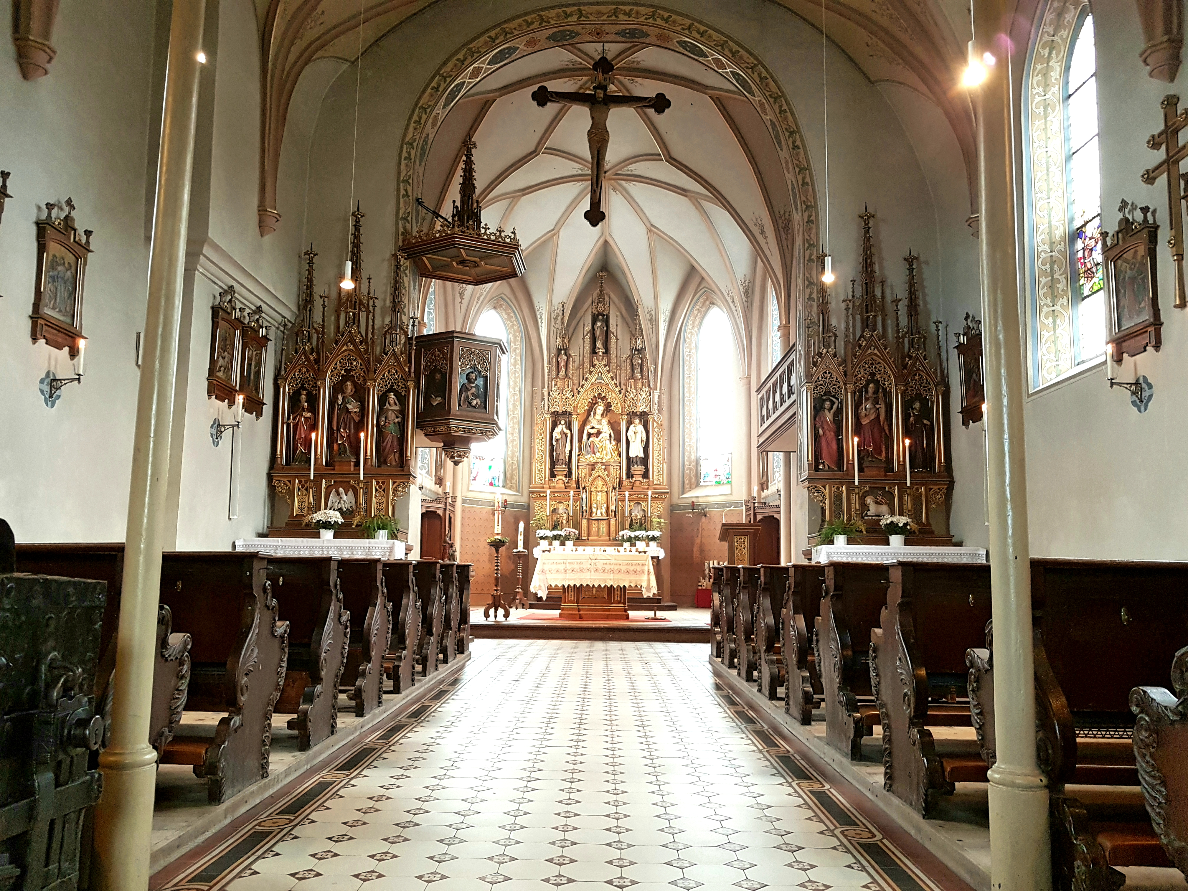 Mariä Verkündigung (Niederscheyern)